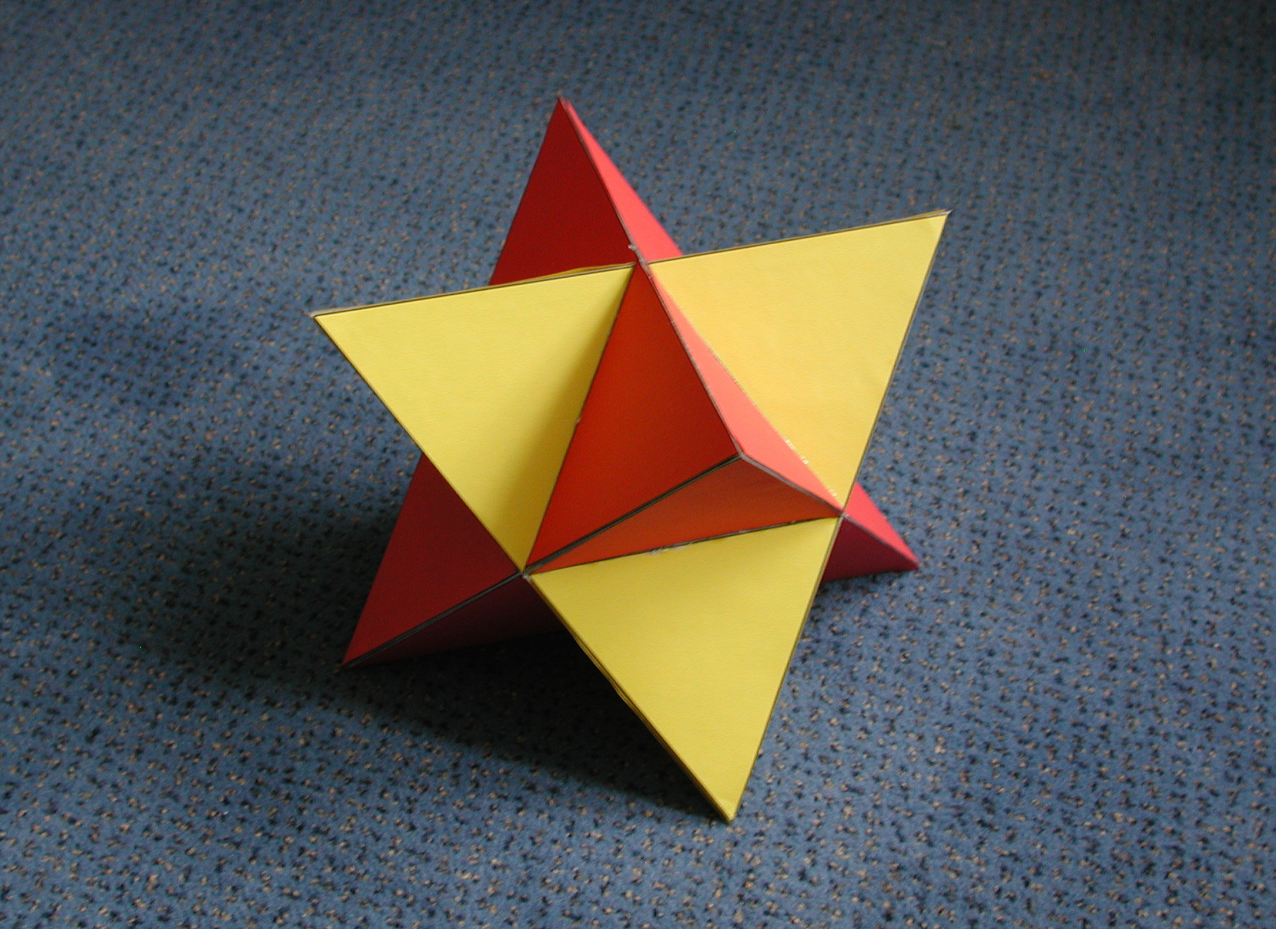 Sterntetraeder